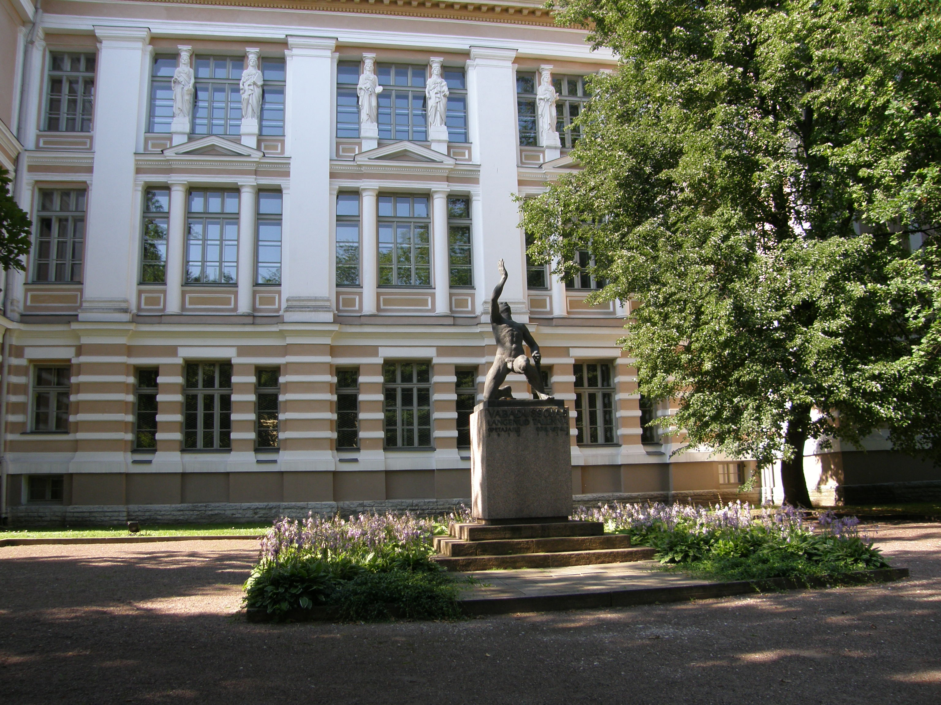 Õppursõdurite monument Reaalkooli ees